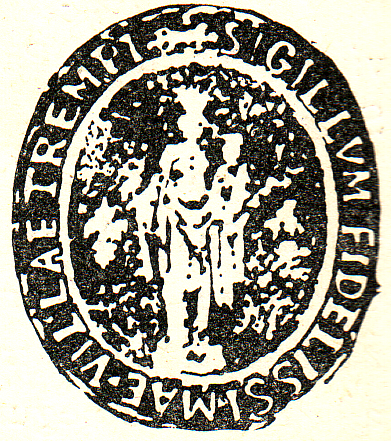 Segell de Tremp anterior al 1900 (Tremp, Pallars Jussà)